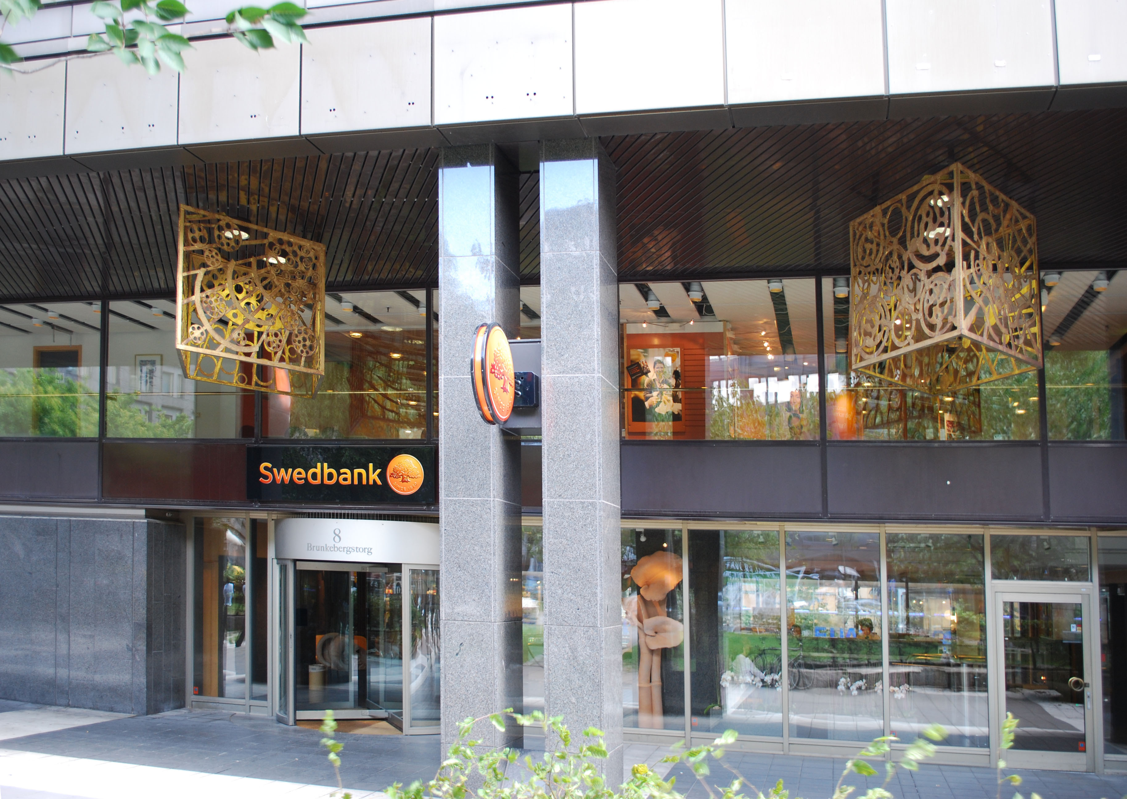 Entren till Swedbanks huvudkontor på Brunkebergstorg